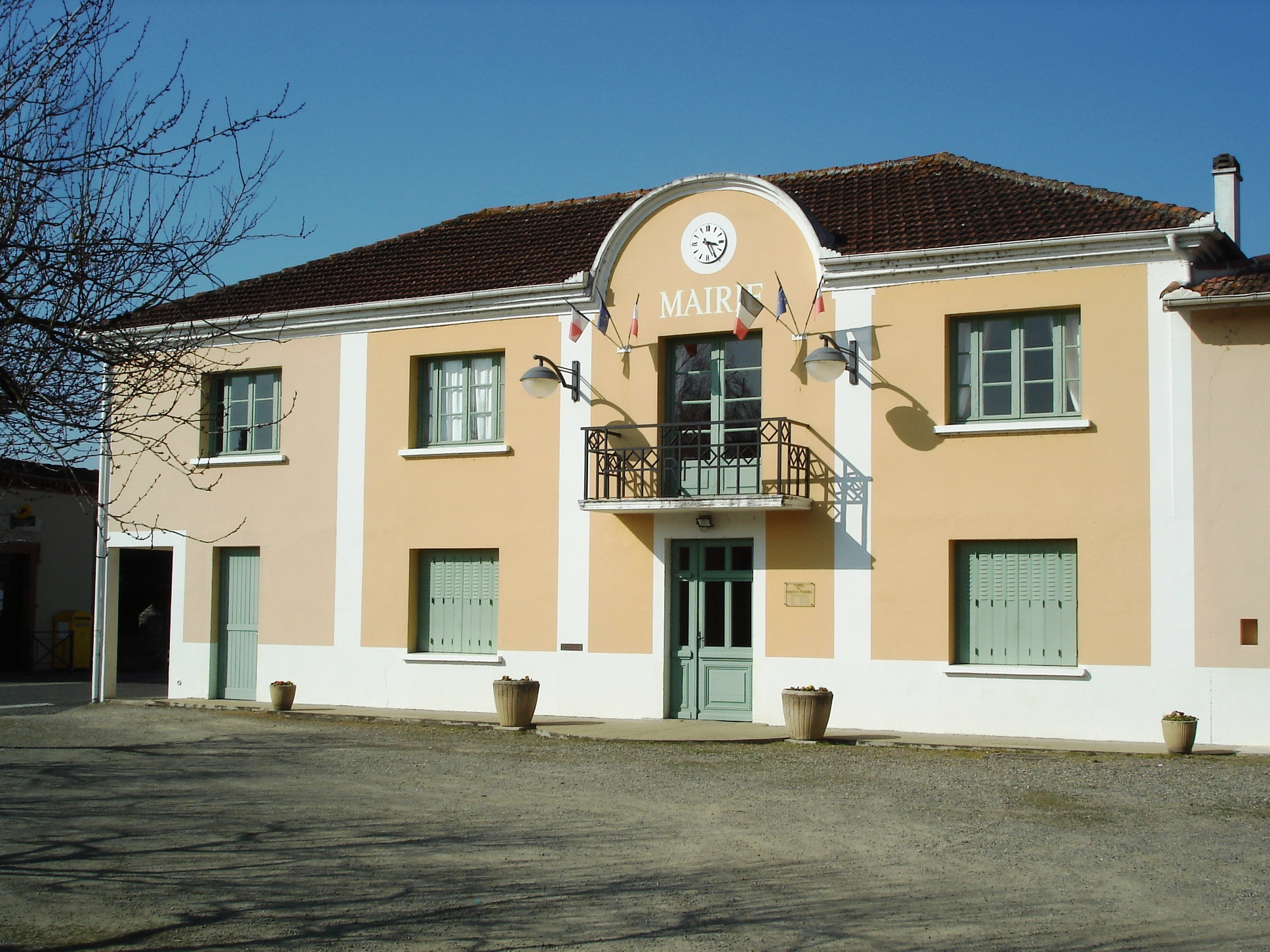 Mairie de Labatut-Rivière, Hautes-Pyrénées, France